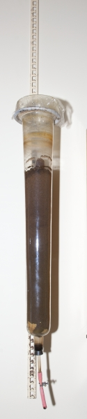 Perkolator på veggstatv